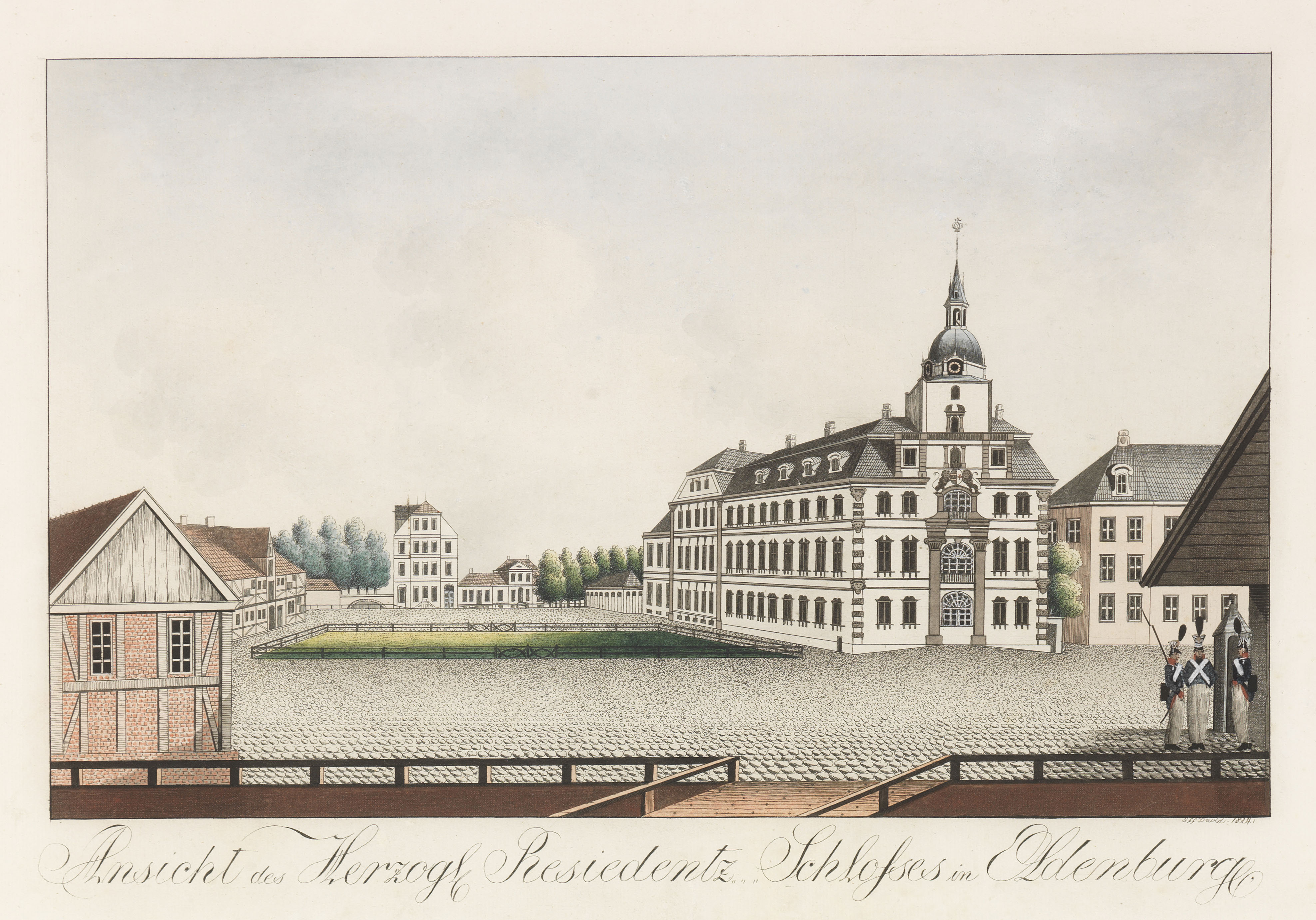 Ansicht des Herzogl. Resiedentz-Schlosses in Oldenburg. Umrißradierung von G. F. F. David, koloriert, 1824. Ca. 31 x 43 cm.